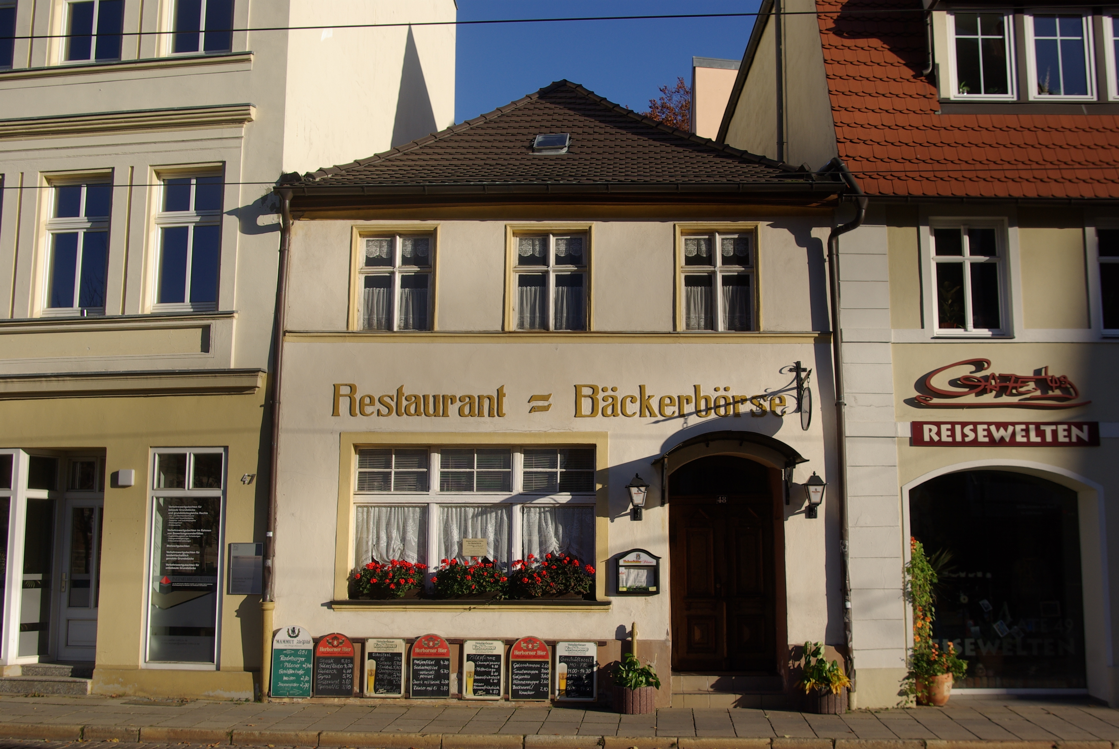 cottbus in Brandenburg. Das Haus in der Sandower Straße 48 steht unter Denkmalschutz.